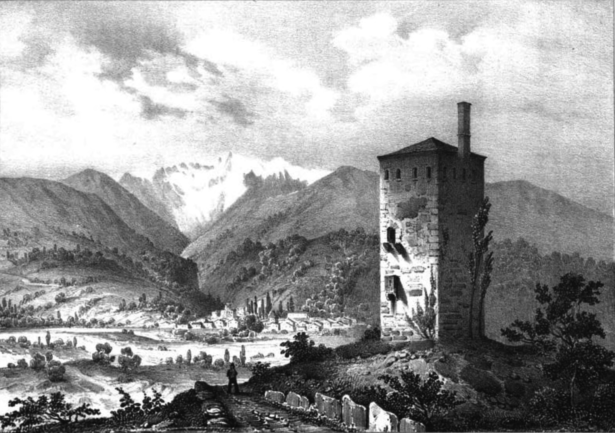 Album du Dauphiné - tome III, litographie de la Tour du Treuil à Allevard